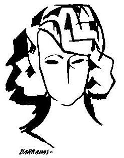 Carmen Barradas (dibujo de Rafael Barradas)